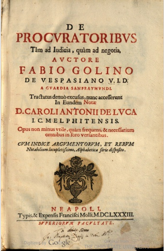 De procuratoribus tam ad judicia, quam ad negotia, auctore Fabio Golino de Vespasiano A. I. D. a guardia sanfraymundi. Tractatus denuo excusis, nunc accesserunt in eundem notae D. Caroli Antonii de Luca.